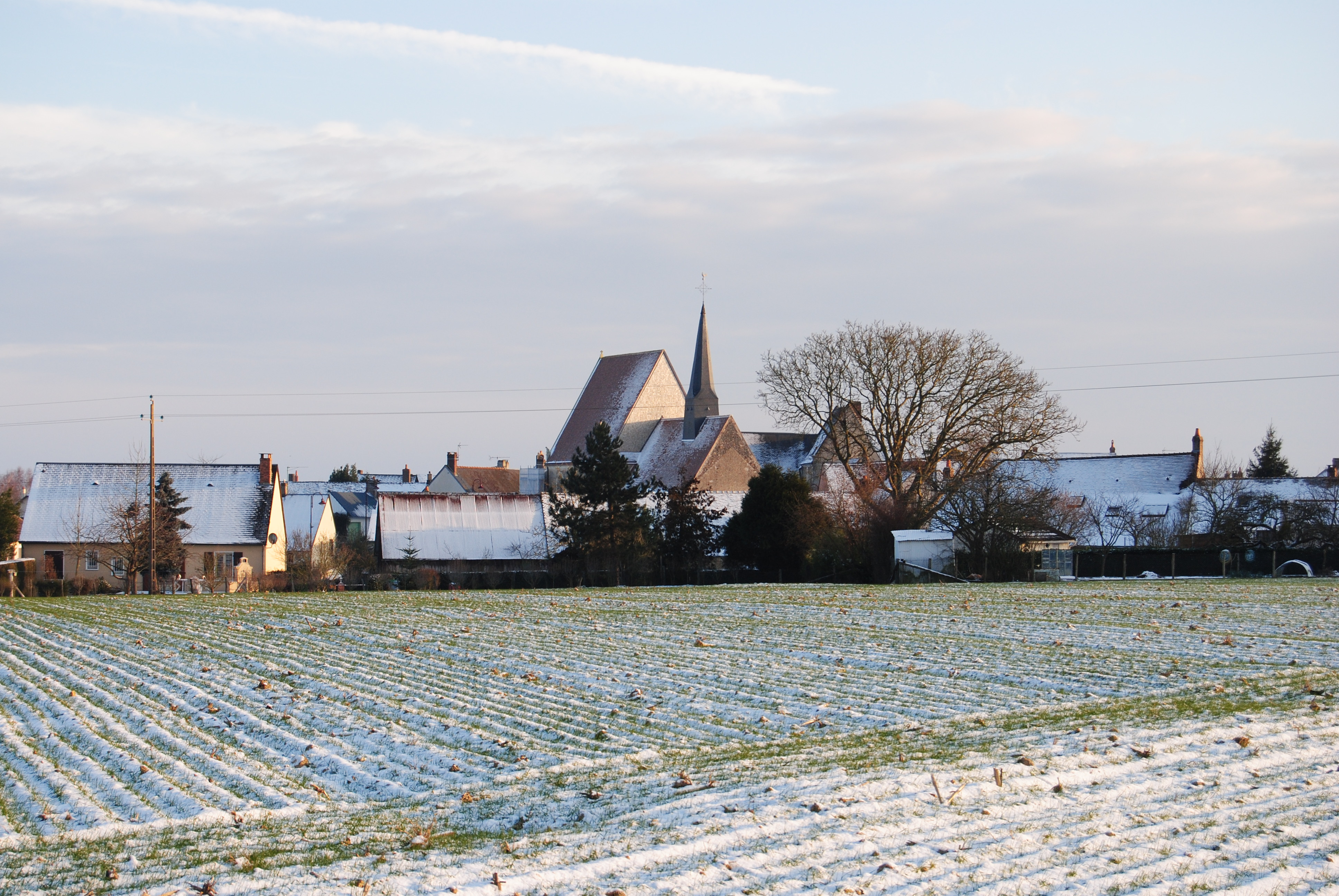 Le bourg et l'Église de Sainte-Cérotte sous la neige.